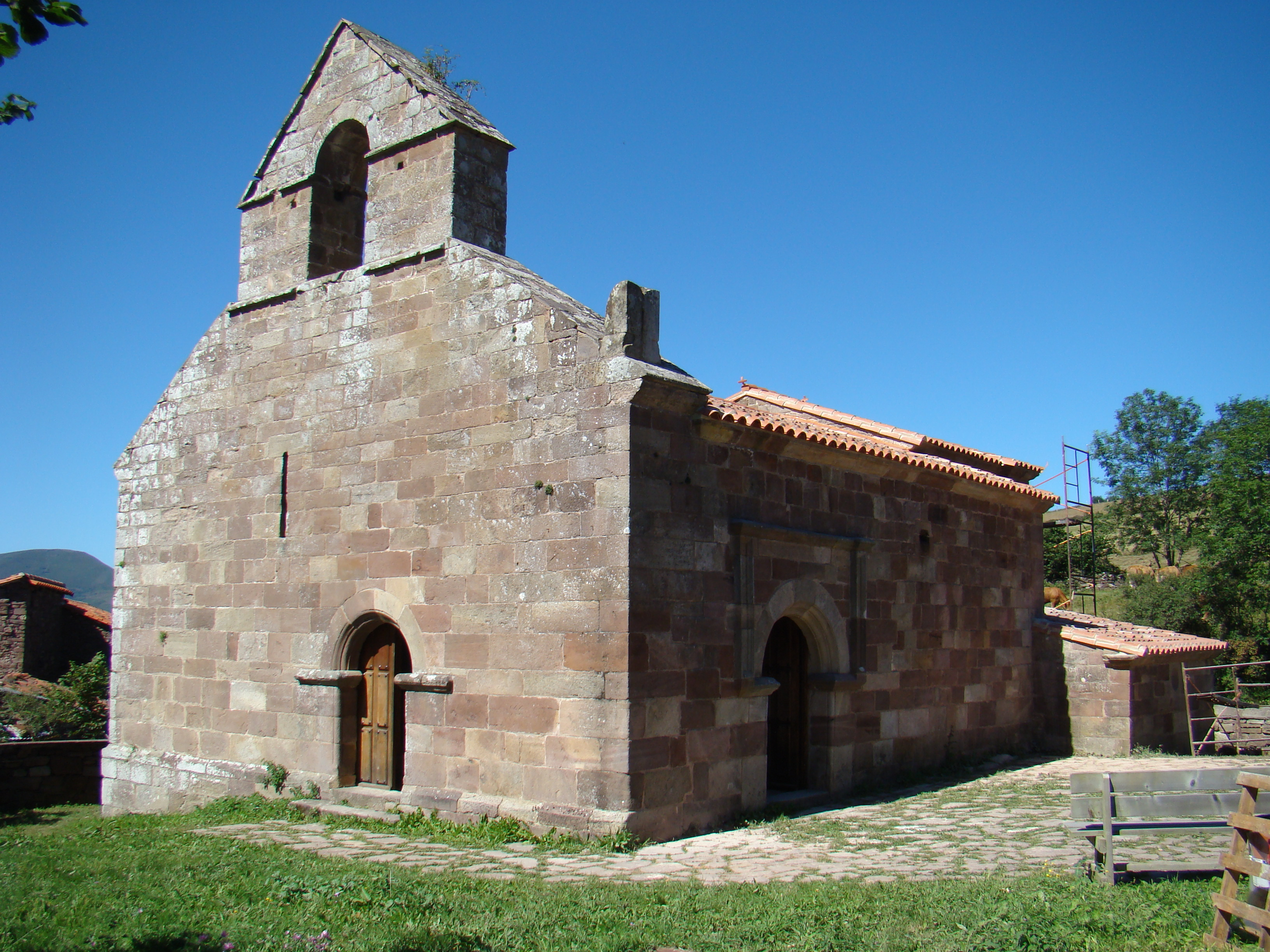 Localidad de Somaconcha en el municipio de Pesquera (Cantabria, España). Ermita de Nuestra Señora.